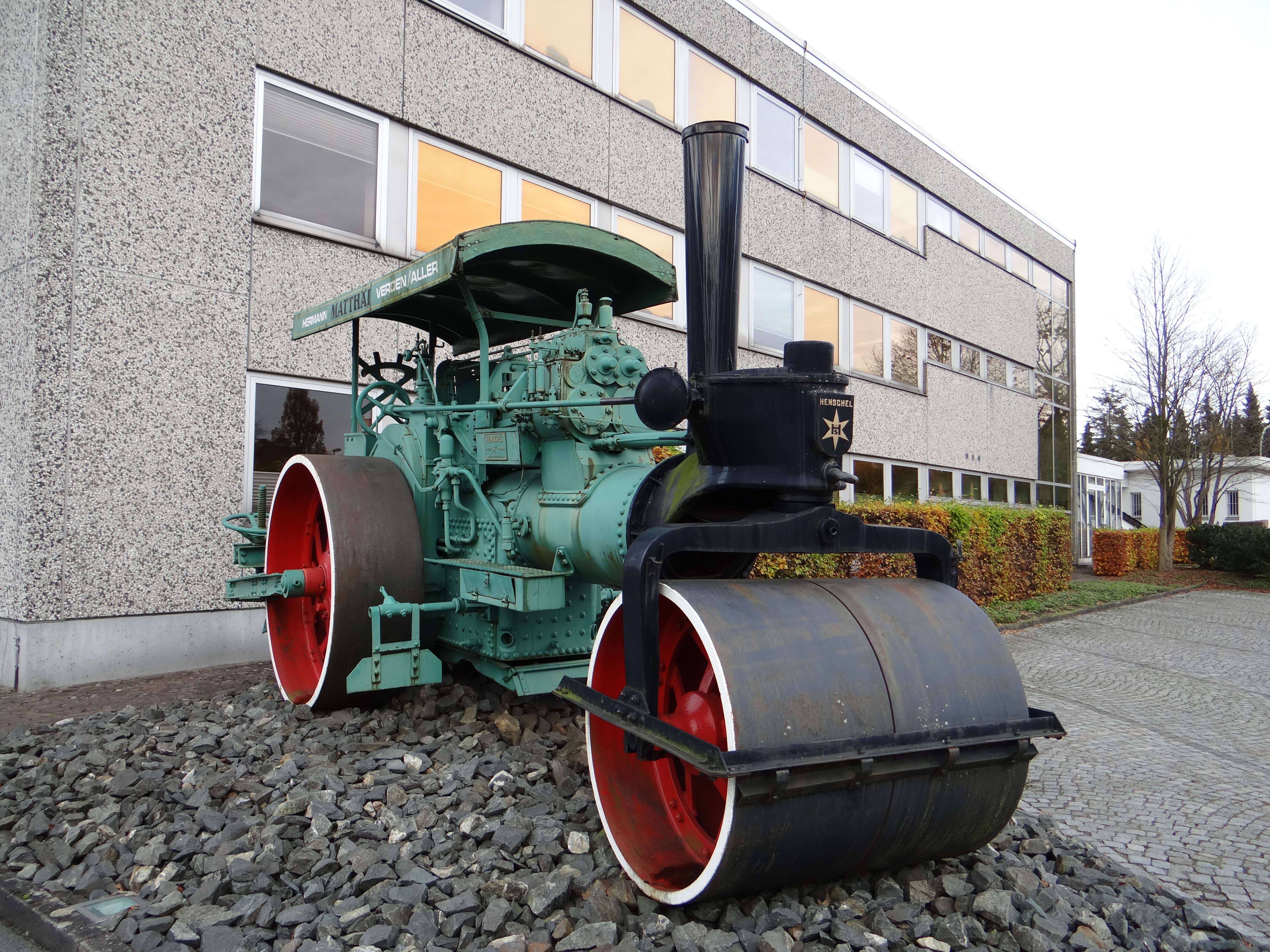 Henschel Dampfwalze vor Matthäi Bauunternehmen